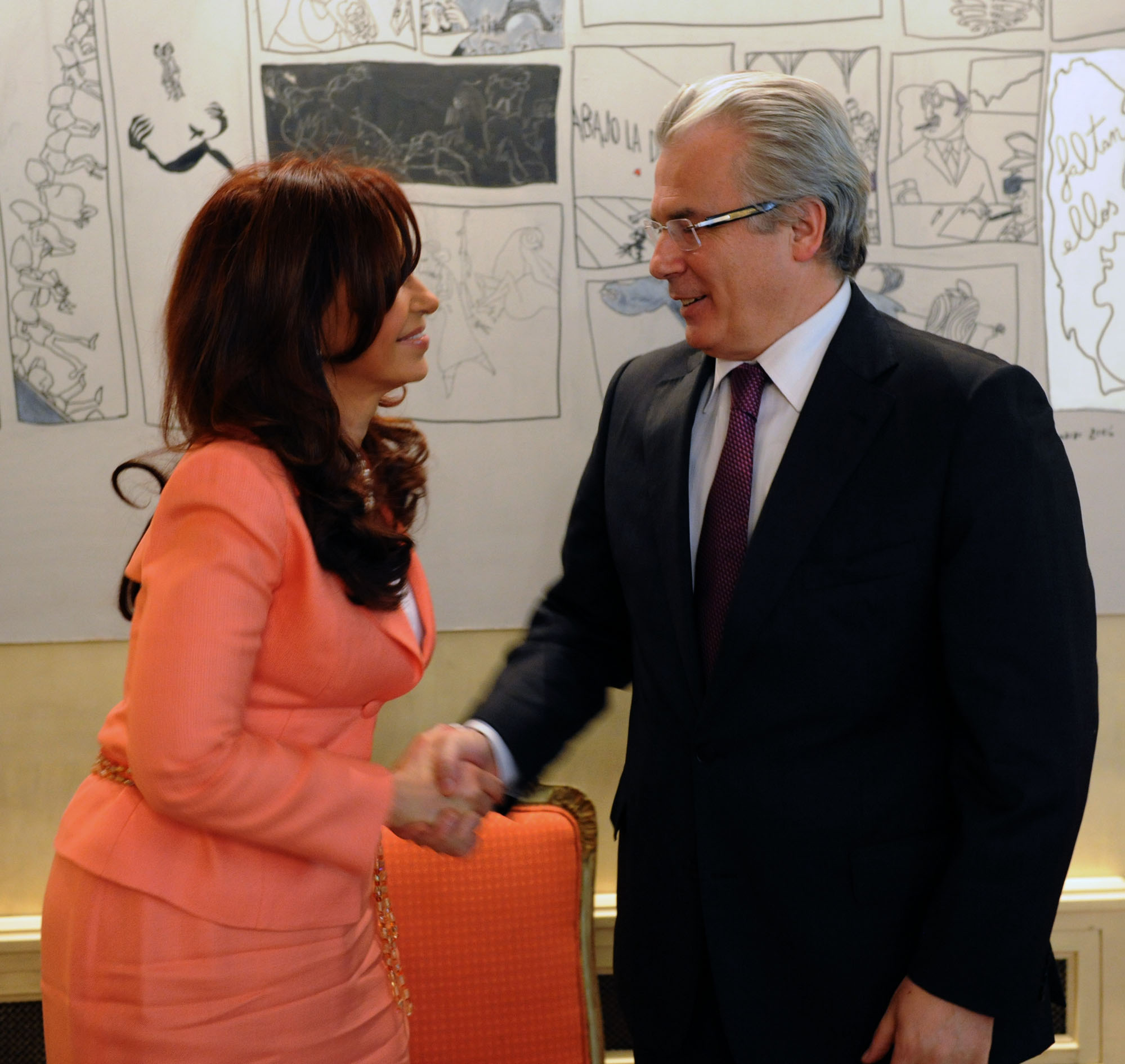 Cristina Fernández saluda al juez Baltazar Garzón, en el marco de su visita a Madrid de mayo de 2010.